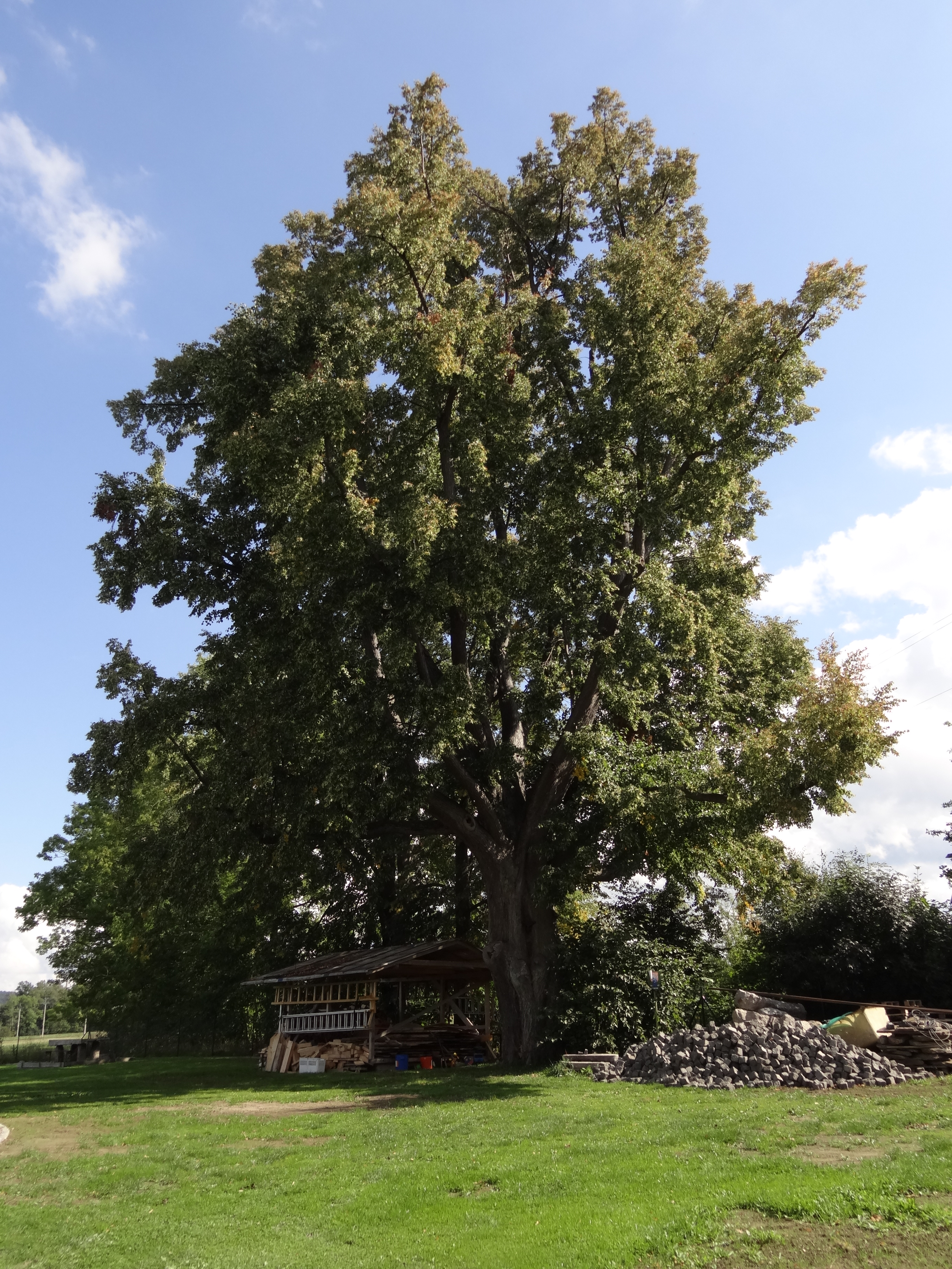 Ludvíkov pod Smrkem - památná Horákova lípa v zahradě novostavby východně od čp. 22